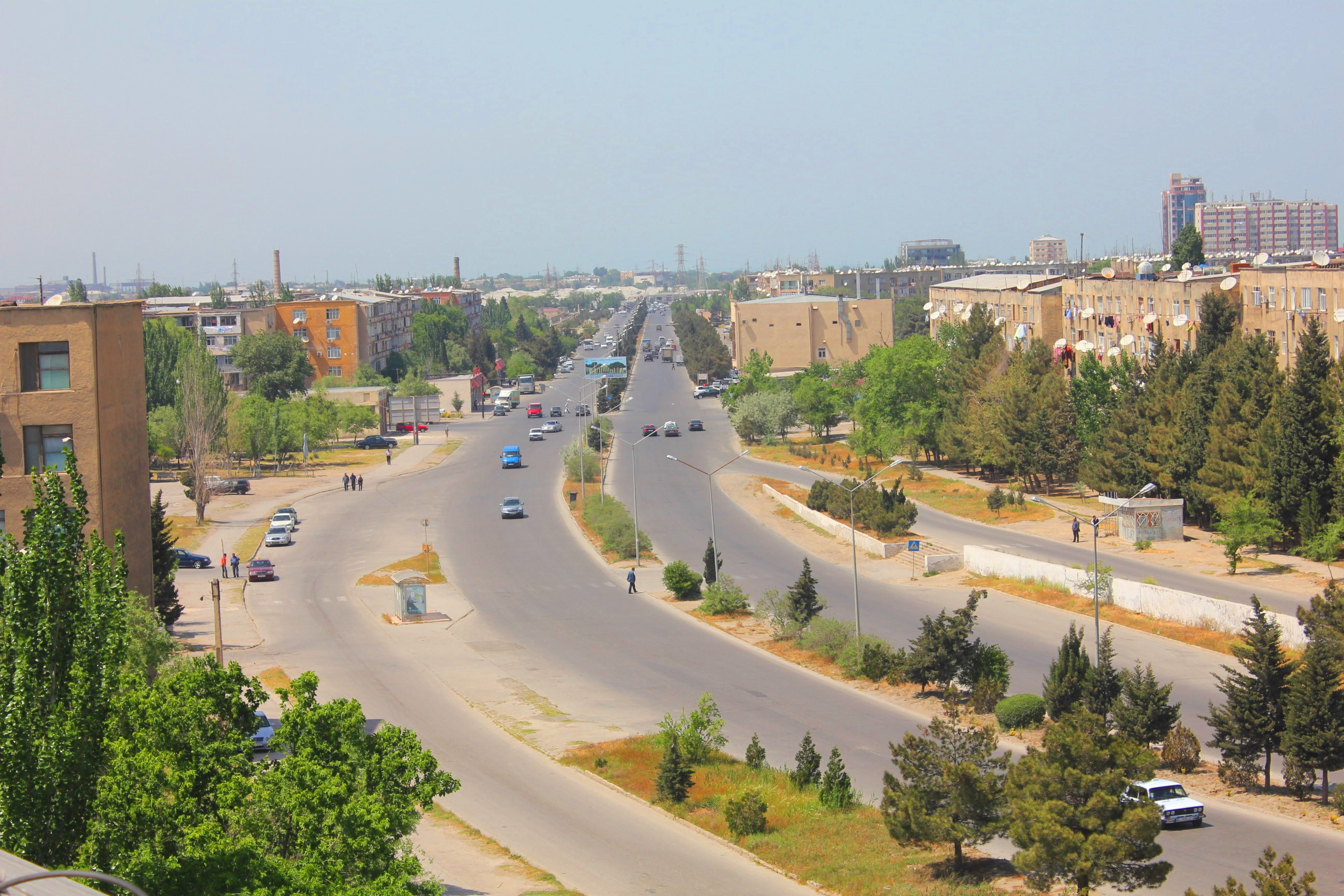 Sumqayıt şəhəri Koroğlu prospekti